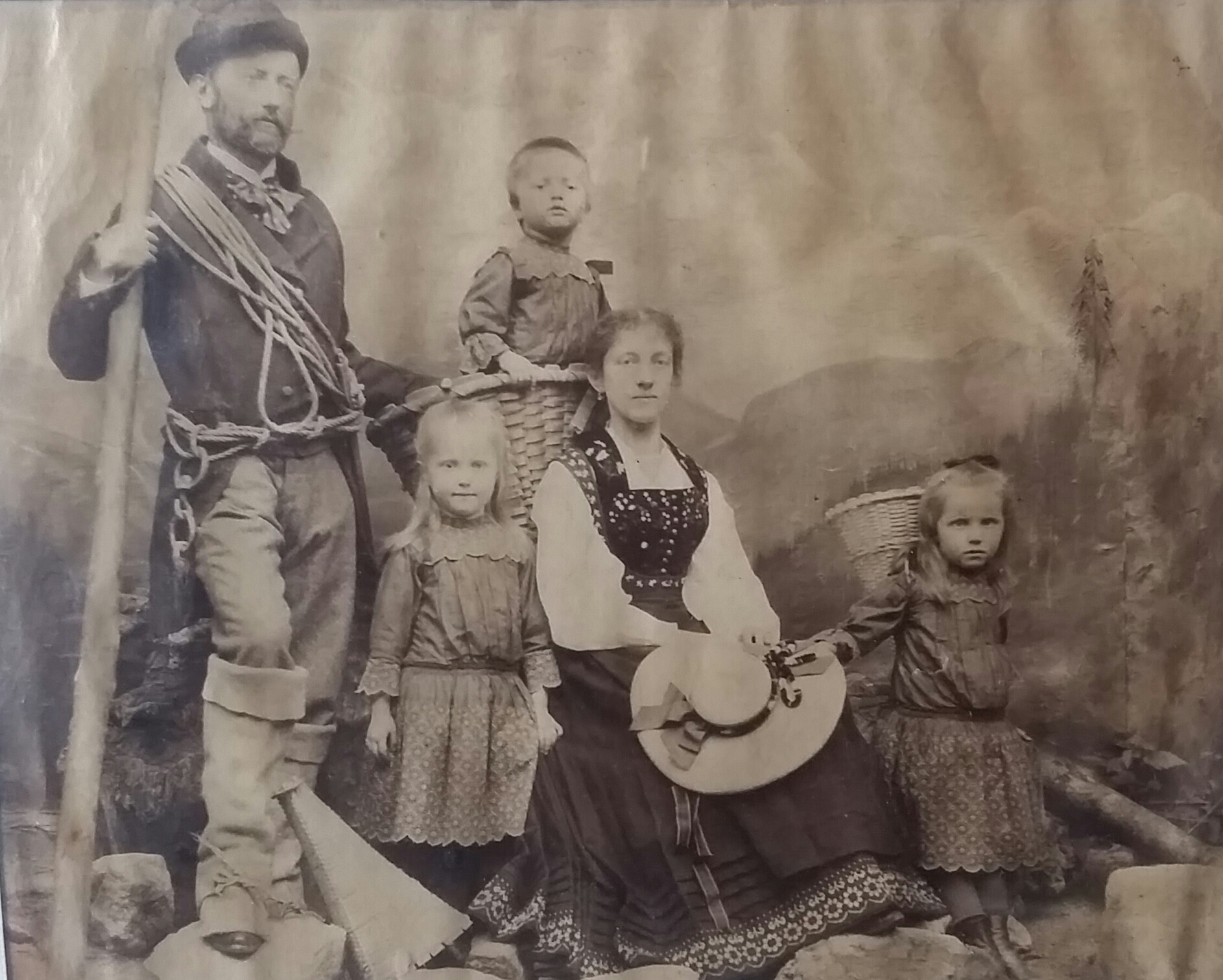 Ritratto fotografico dell'Avv. Luigi Vaccarone con la famiglia in tenuta da alpinista